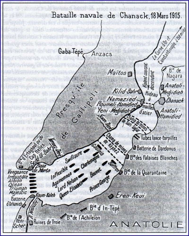 Carte de l'attaque navale franco-anglaise contre le détroit des Dardanelles le 18 mars 1915 avec position des navires alliés, des forts et des champs de mines turcs. Carte sans date précise, probablement vers 1920.